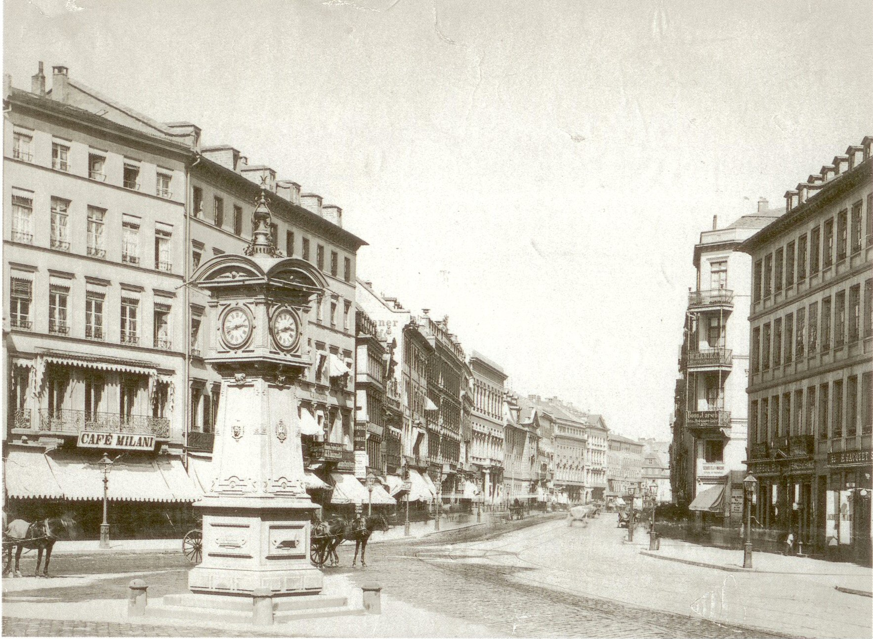 Das Café Milani am Eingang der Zeil, um 1885, dem Versammlungsort der rechten Fraktion der Nationalversammlung, direkt daneben das Café Mozart mit dem Gebäude Wiedenhof. Die zukünftige Hauptpost von Frankfurt am Main ist noch nicht gebaut. 1902 entstand unter dem Architekten Otto Sturm (* 21.12.1865 Darmstadt + N.N.) für den Verlag und die Buchhandlung Franz Benjamin Auffahrt ein mehrstockiges Geschäftshaus an der Stelle des traditionsreichen Café Milani. Direkt östlich daneben errichteten 1904 die Architekten Josef Rindsfüßer und Martin Kühn an der Stelle des nicht weniger stadtbekannten Café Mozart das Geschäftshaus von Frank & Baer Textilwaren, später Kaufhaus Tietz, dann arsisierter Kaufhof.